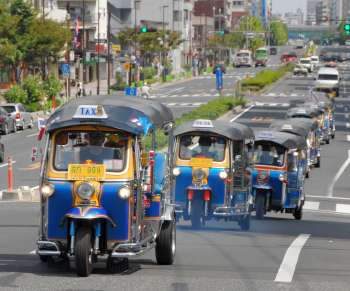 TukTuk Meeting 2007